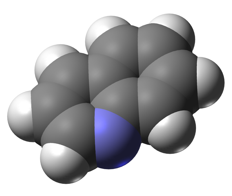 Xinolin 3D